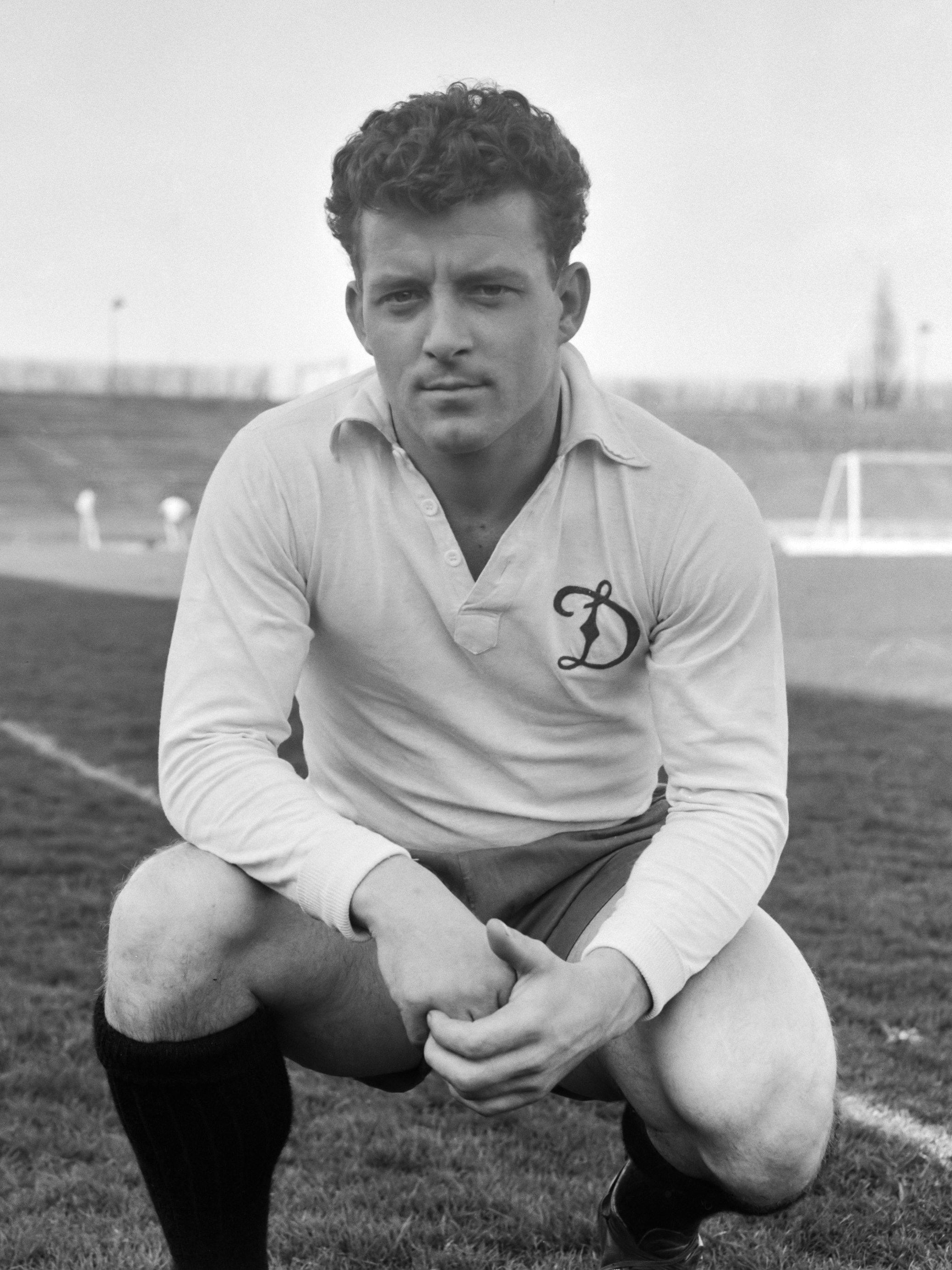 Reinier Kreijermaat 16 maart 1961